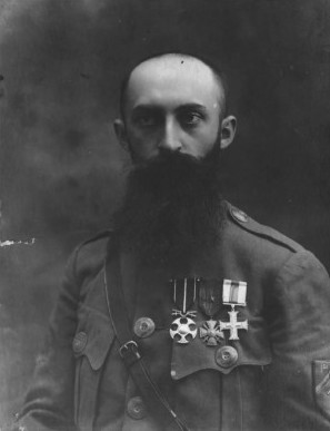 Josef Zmek, český generál a legionář